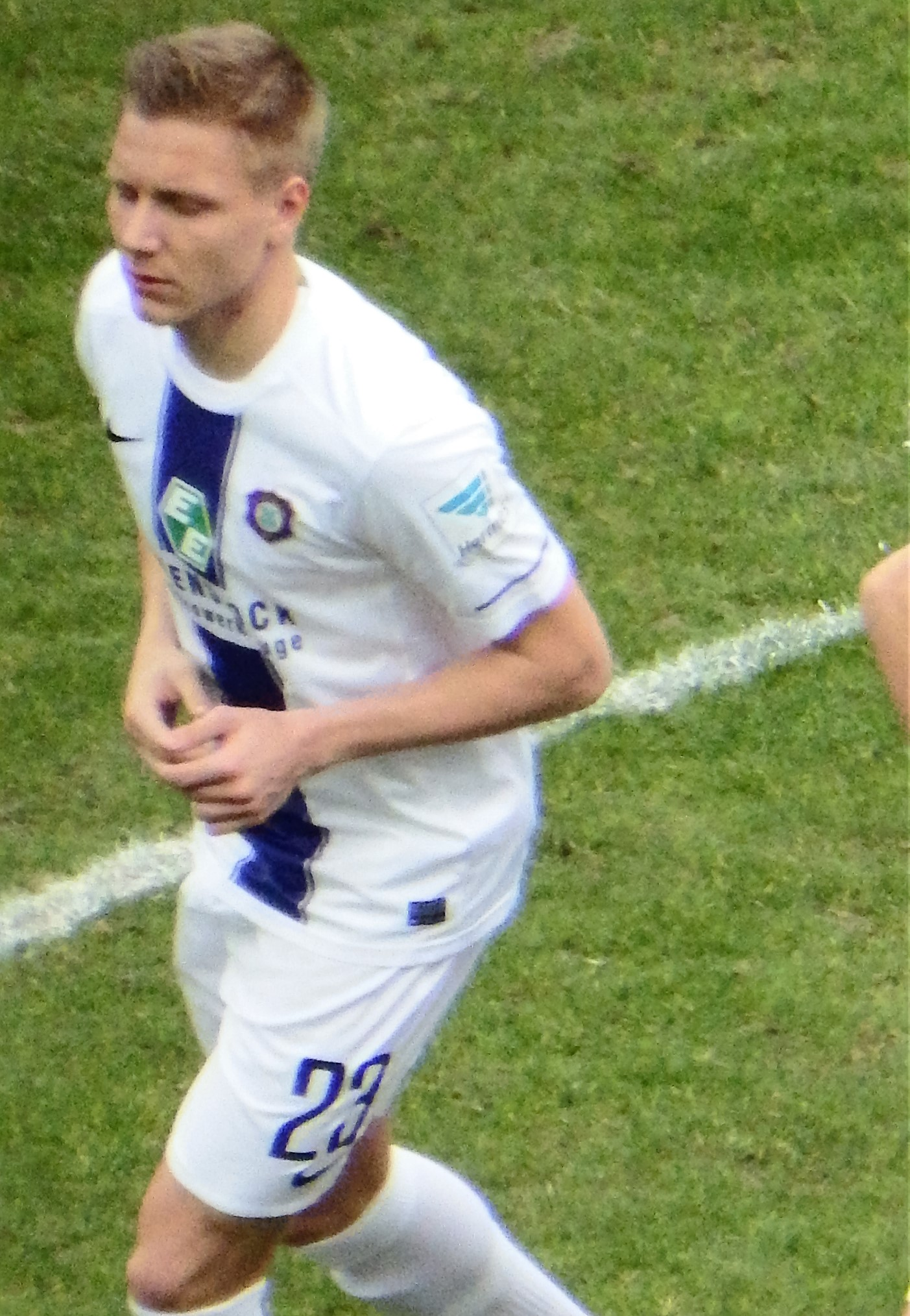 Dorian Diring Aue